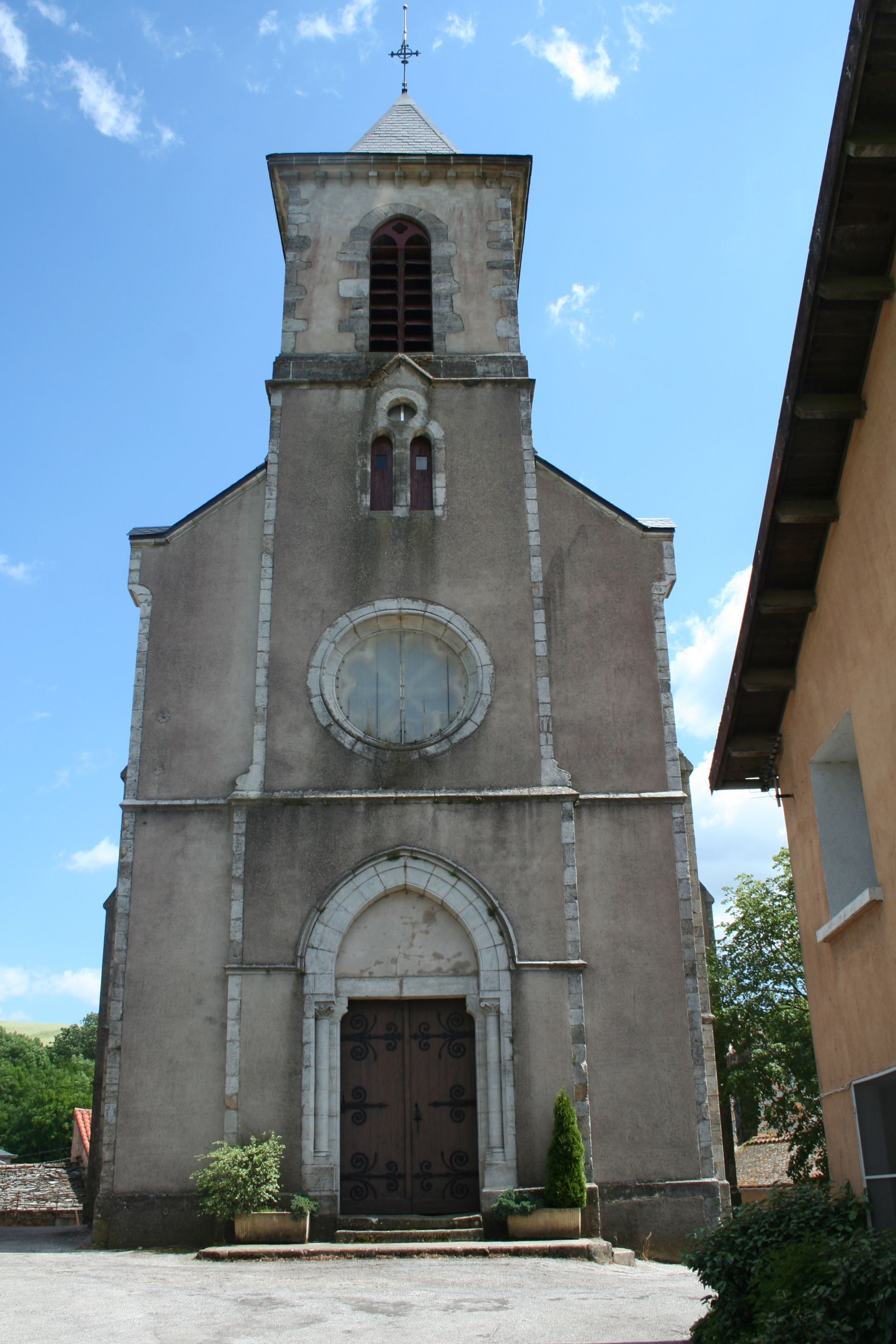 Montagnol (Aveyron) - église Saint-Martin - façade occidentale.